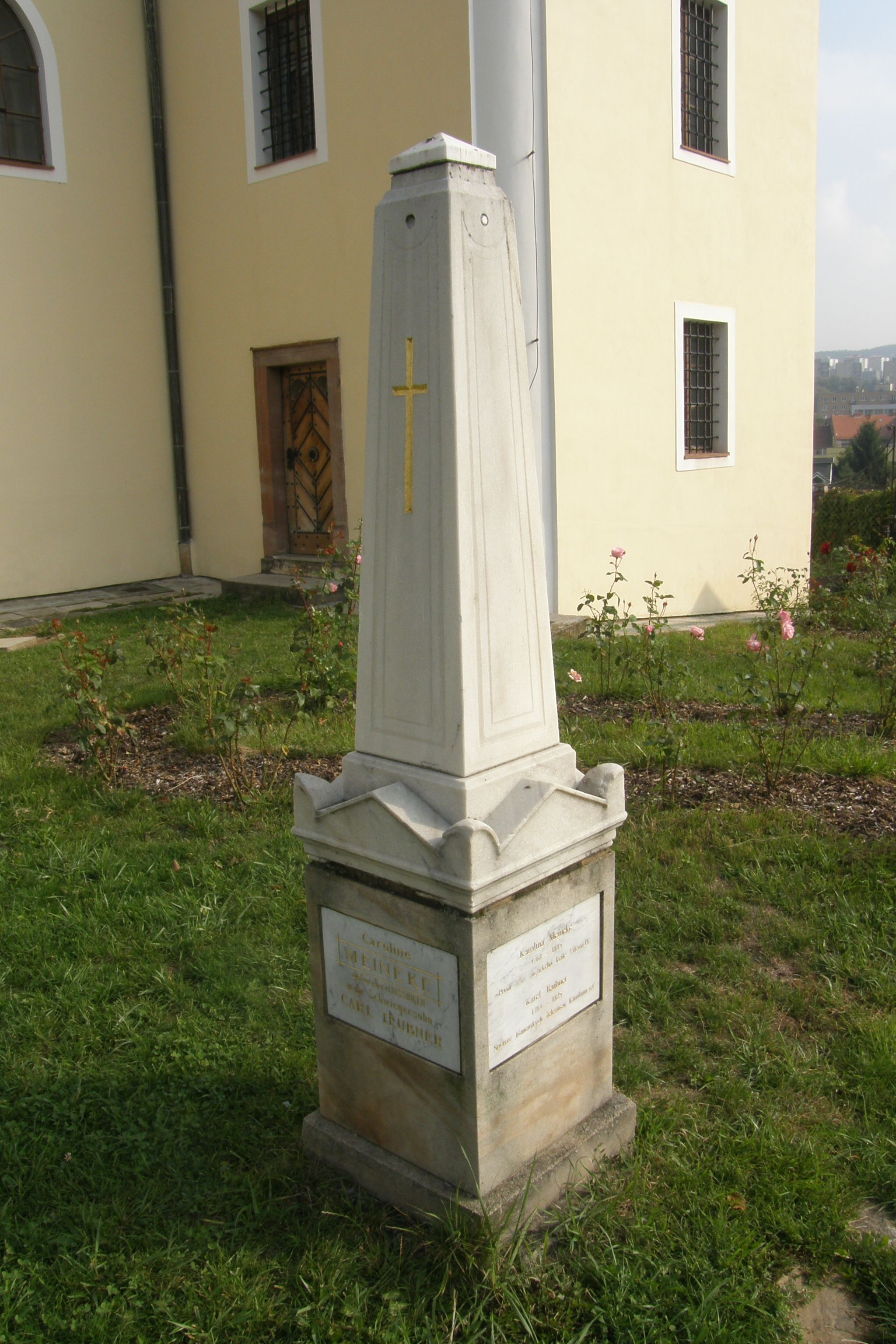 Kostel sv. Martina (Blansko), Komenského 1139, Blansko